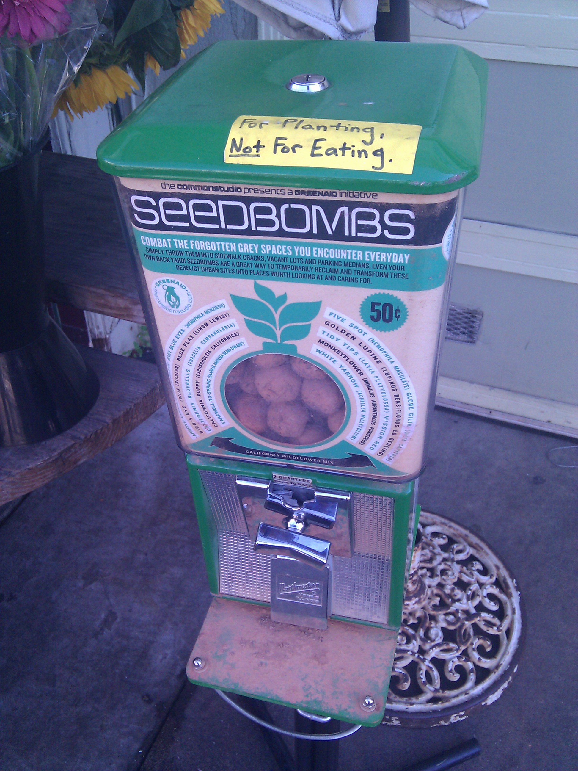 san Francisco